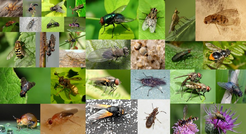 Montage réalisé avec plusieurs images de Wikimedia Commons